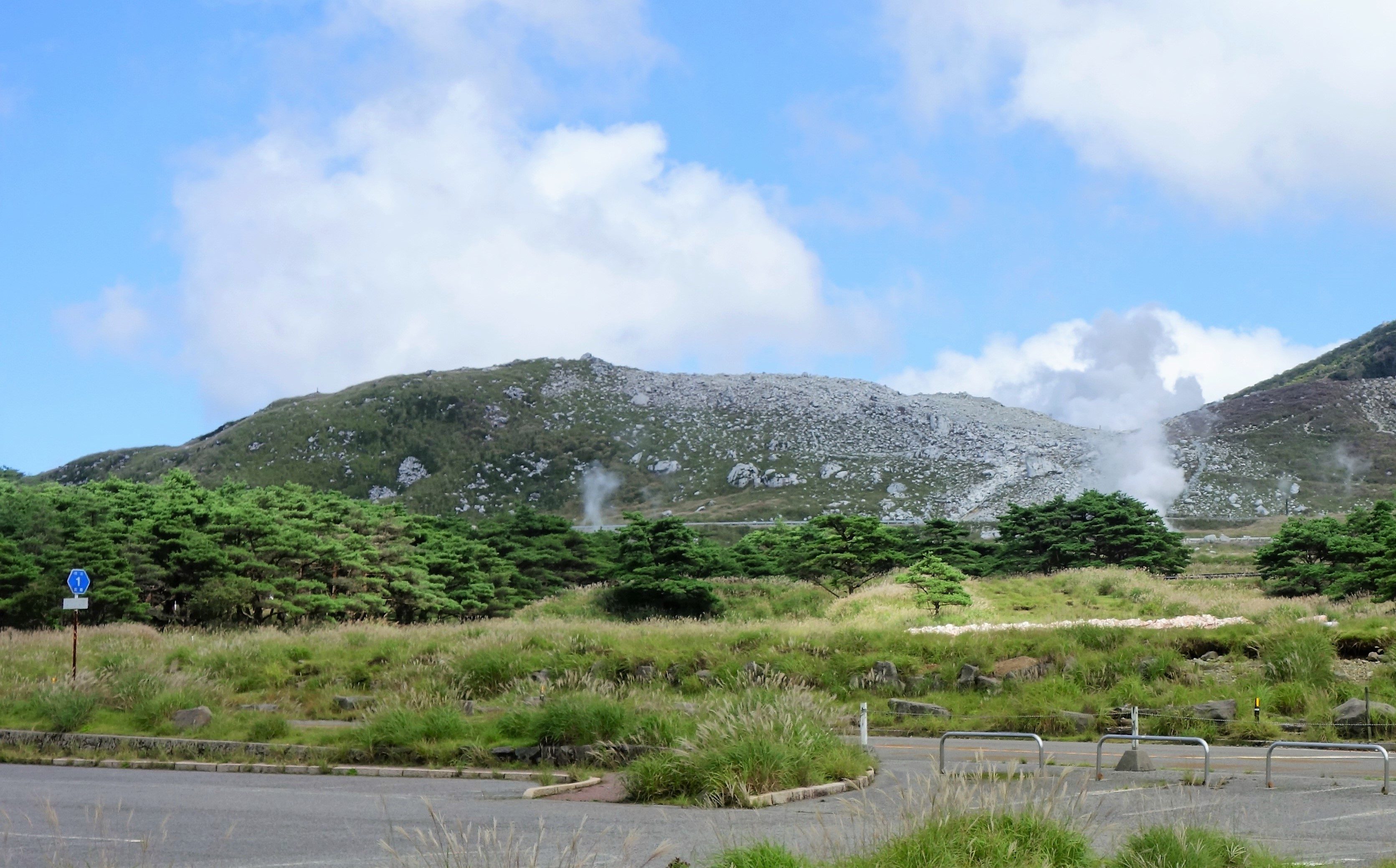 2018年9月、噴気をあげる霧島連山の宮崎県硫黄山(写真左側）。えびのエコミュージアムセンターより撮影。